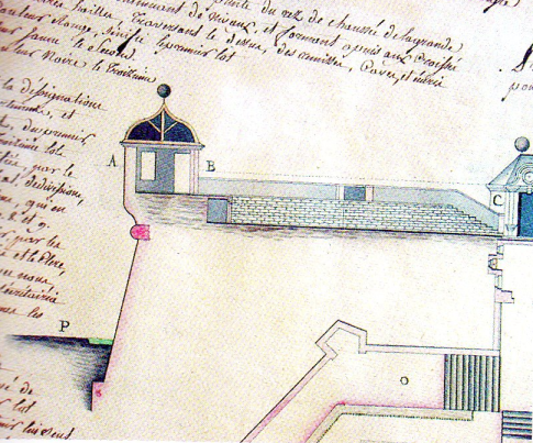 Coupe du bastion de Brozillay (remparts de Vannes) signé du 28 germinal an III